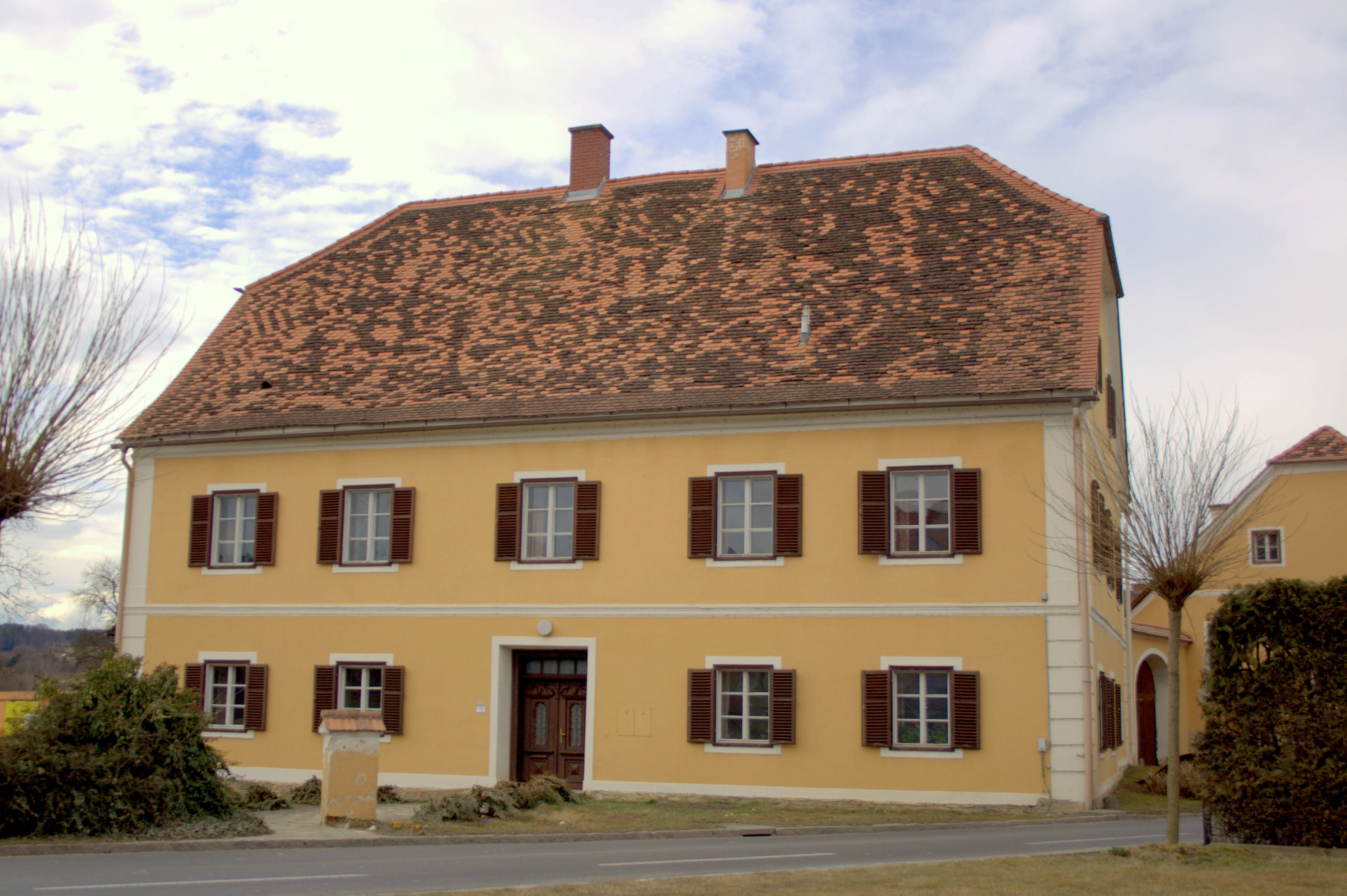 Ebersdorf Pfarrhof